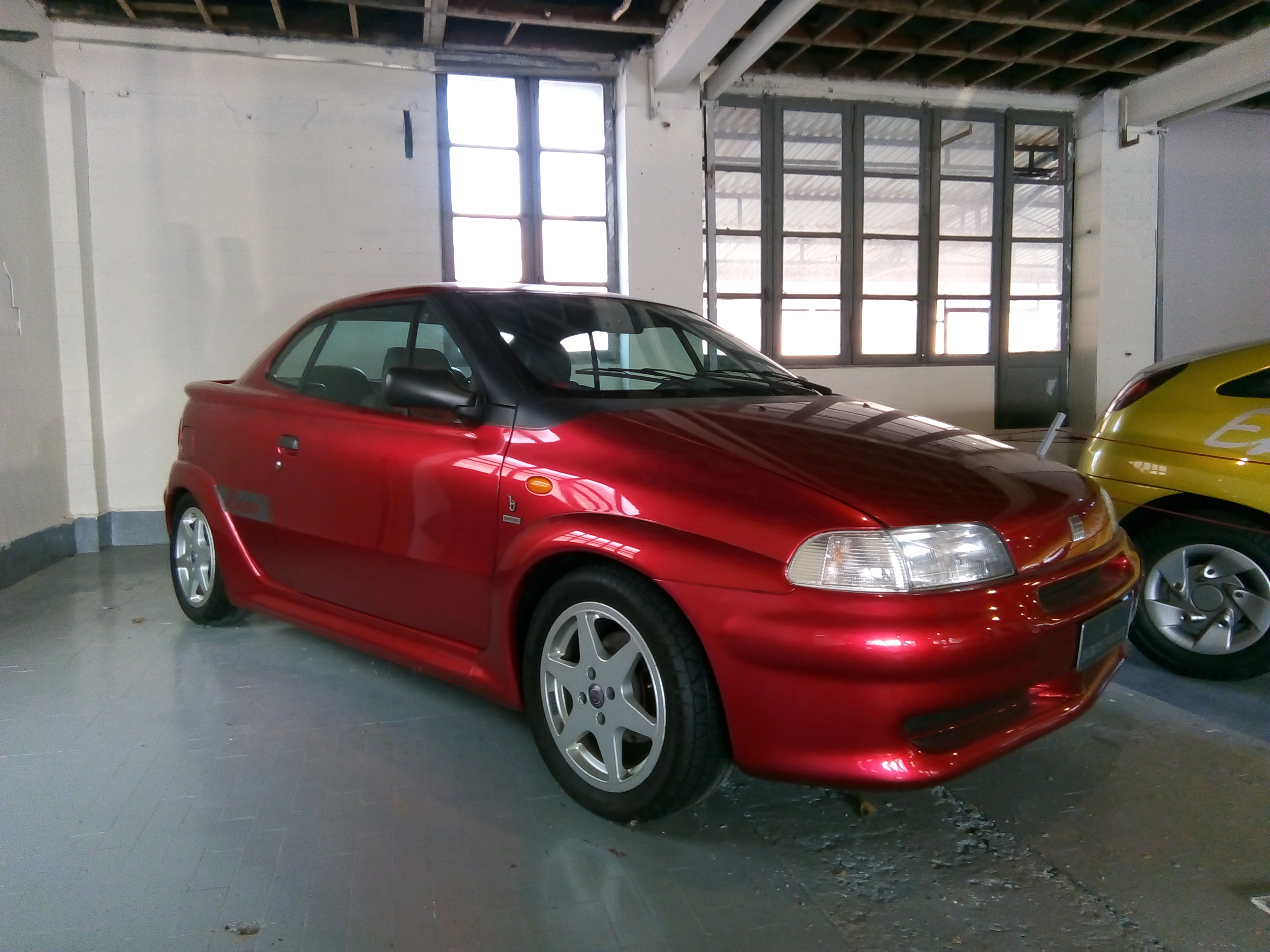 Fiat Punto Racer